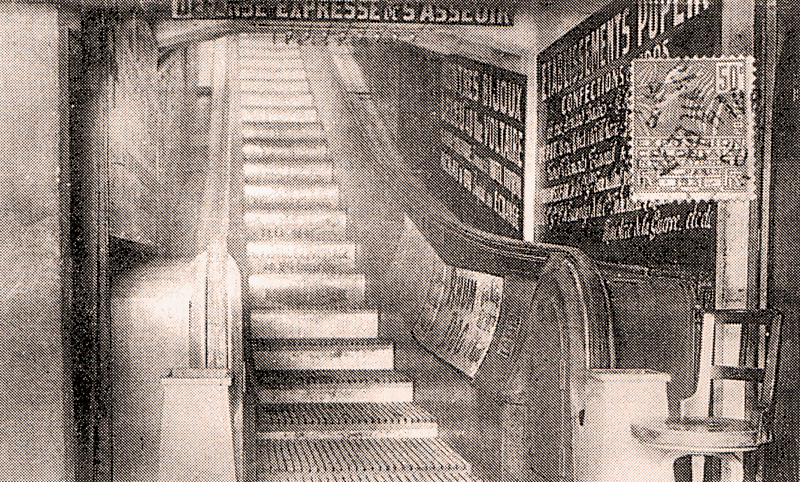 L'escalier mécanique au Havre